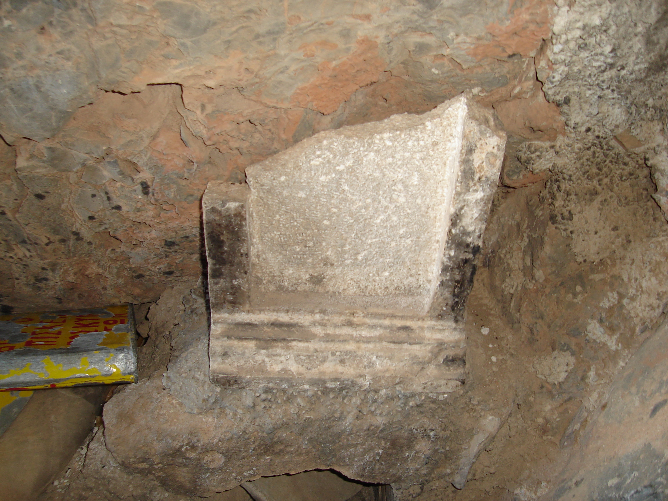 η Χαμενη εικονα του Αφέντη Χριστού στα Αμιρα